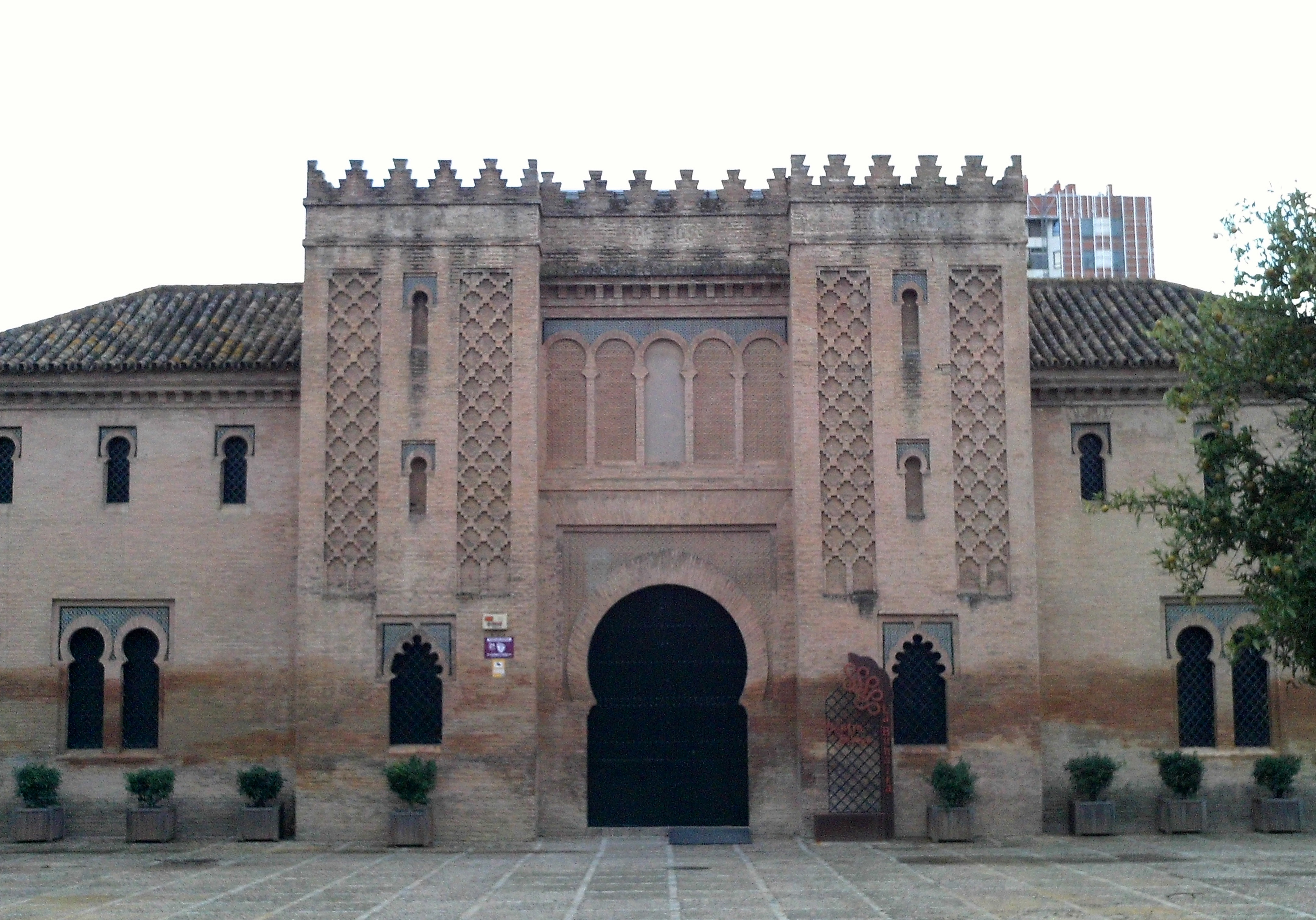 Edificio construido en 1892 sobre las ruinas del antiguo palacio de la Buhaira. Jardines de la Buhaira, Sevilla, Andalucía, España.